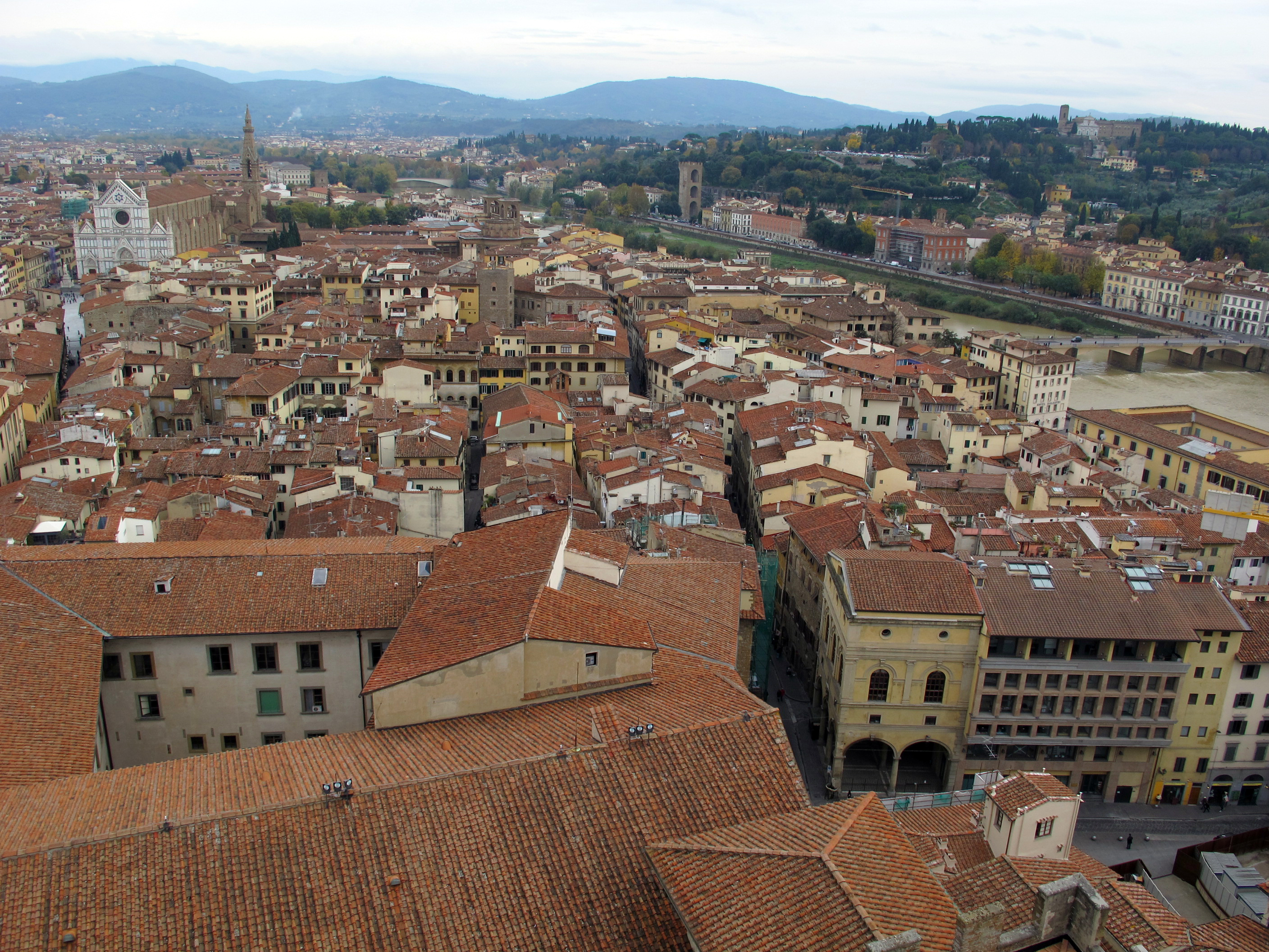 Torre di arnolfo, veduta loggia del grano